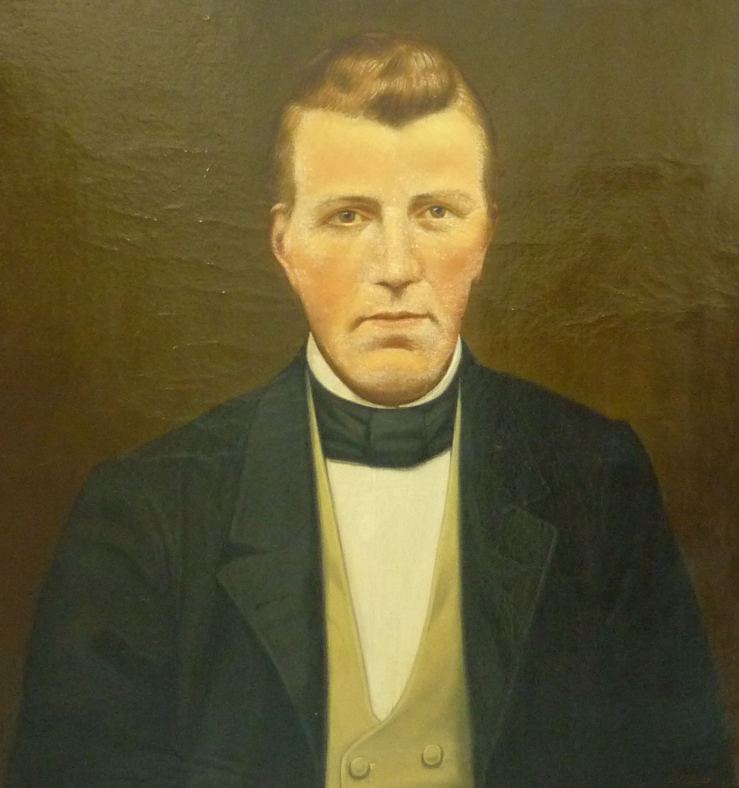 Andries Hubertus van de Mortel (1835-1863) was burgemeester van Deurne van 1860-1863.